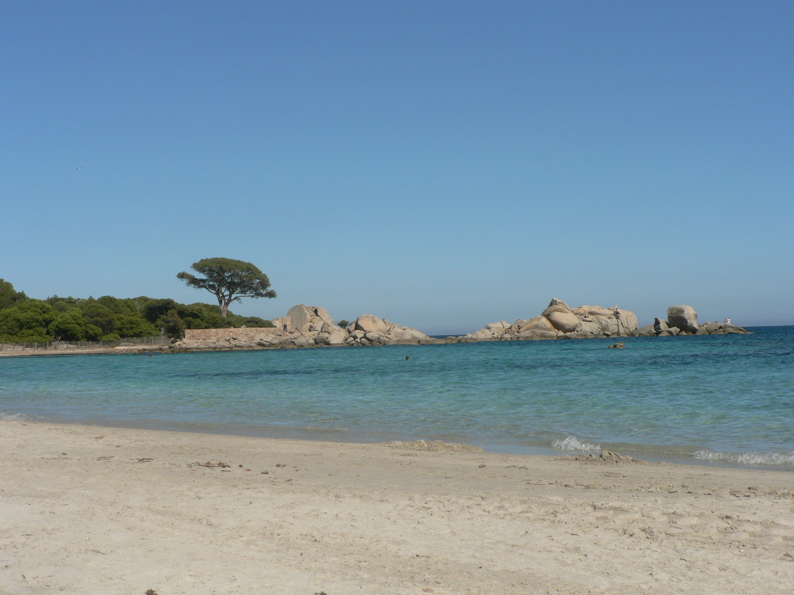 La plage de Palombaggia et son pin parasol, sur la commune de Porto-Vecchio (Corse-du-Sud)